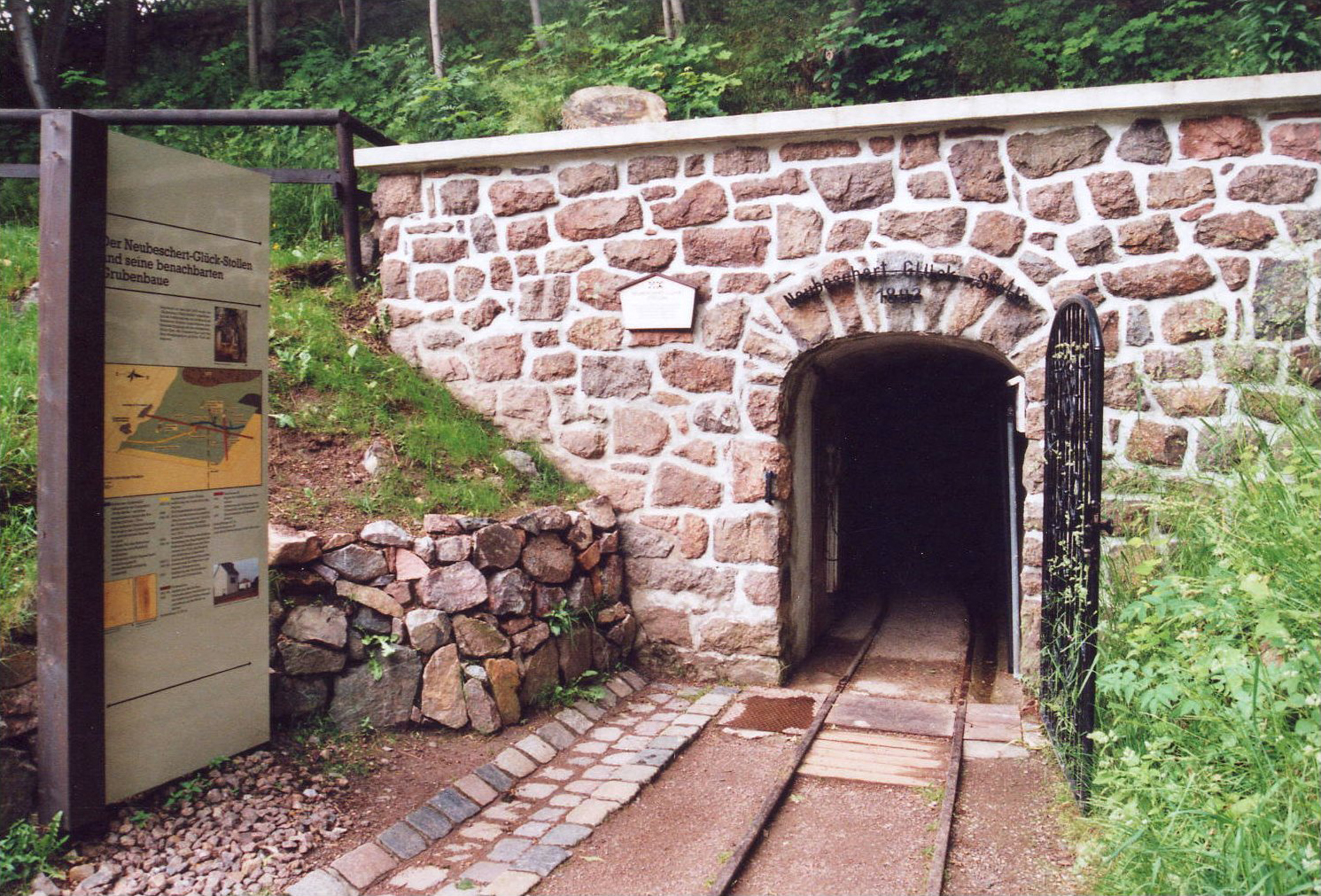 Altenberg (Erzgebirge): Mundloch des "Neubeschert-Glück-Stollens" im Bergbaumuseum